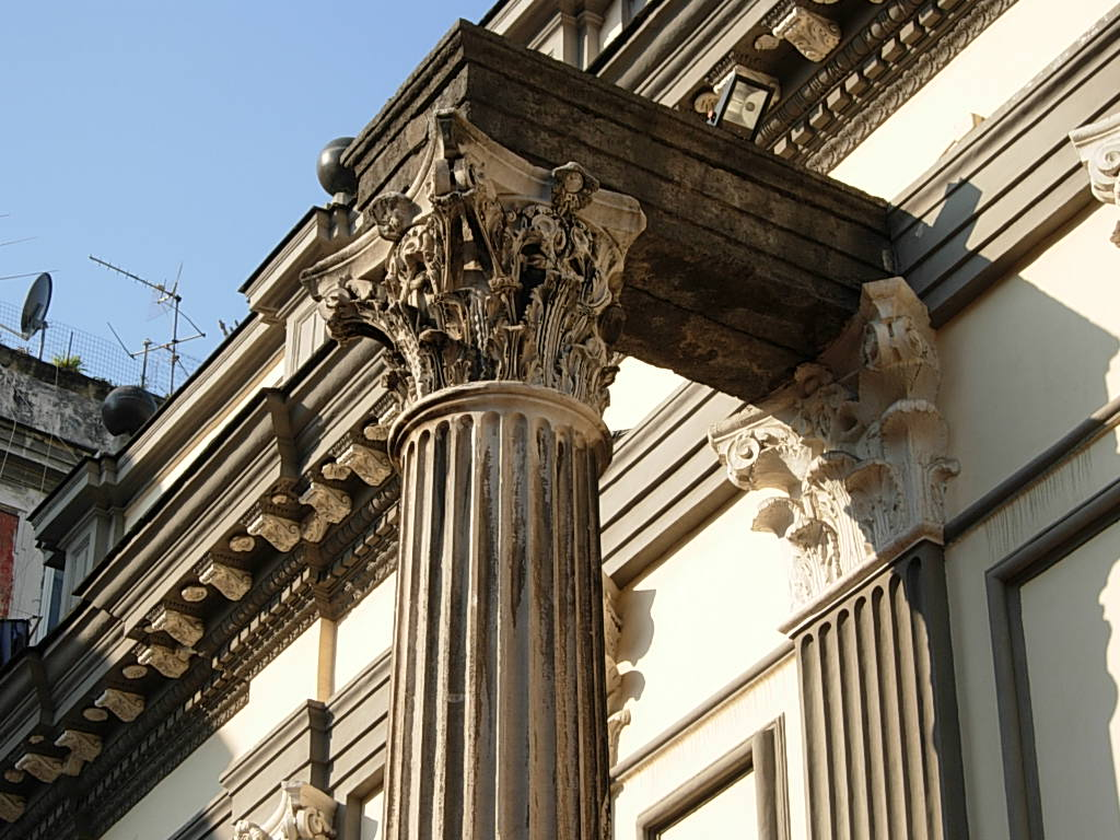 San Paolo Maggiore (particolare facciata) - Napoli. Capitello romano di spoglio dal Tempio dei Dioscuri.